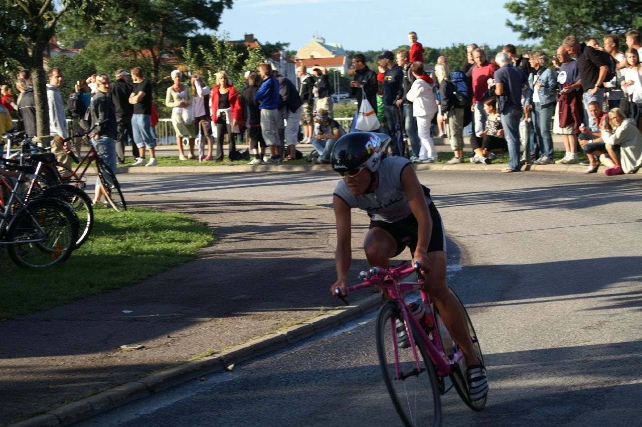 Eva Nyström Ironman Kalmar 2007